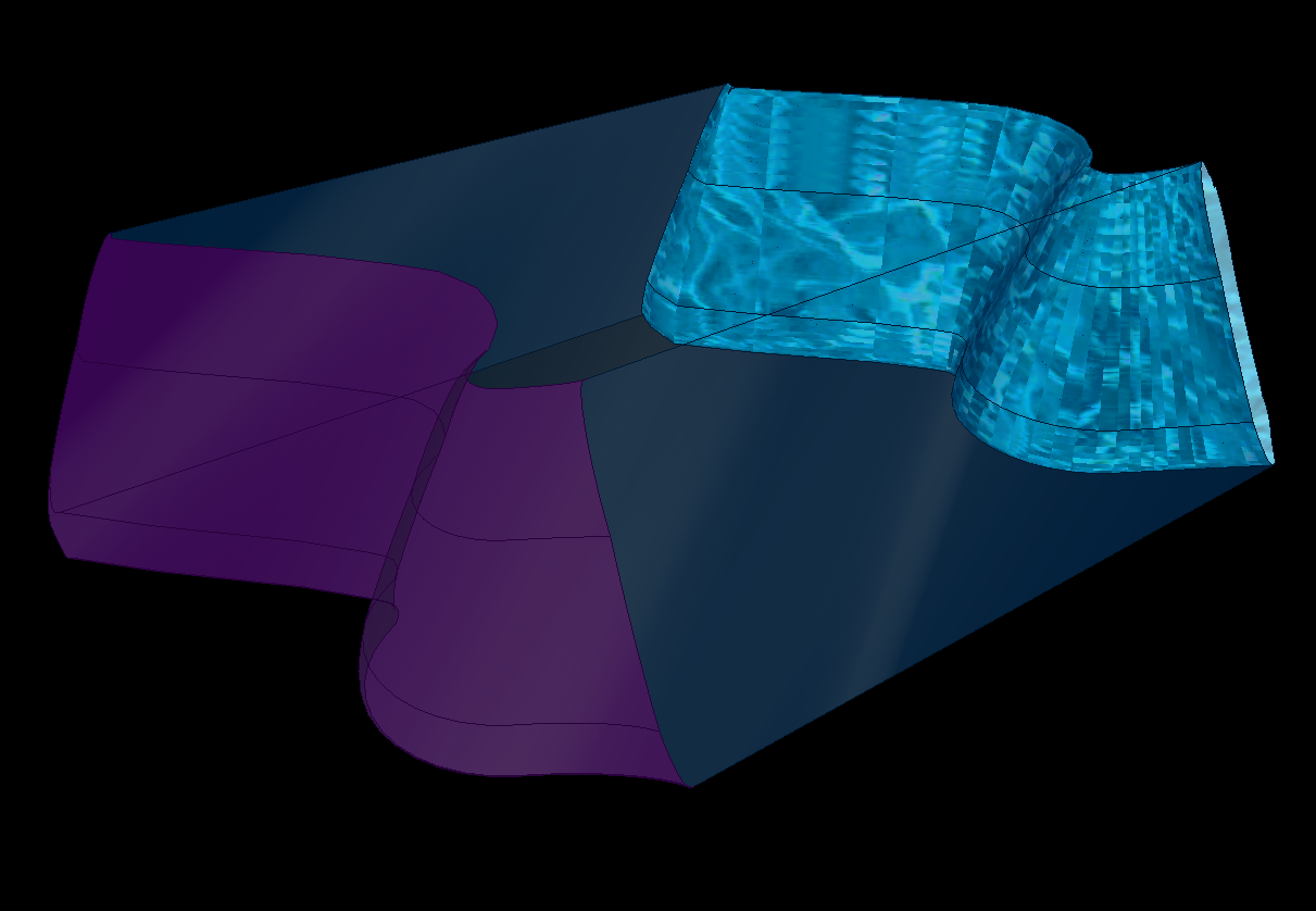 Illuste schématiquement une partie du volume d'univers d'une 3-brane.